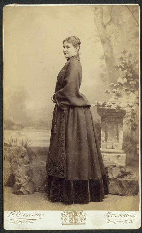 Kabinettsfotografi. Porträtt av kvinna iklädd reformdräkt. Kroppen sedd från sidan, ansiktet i halvprofil. Ateljébild.